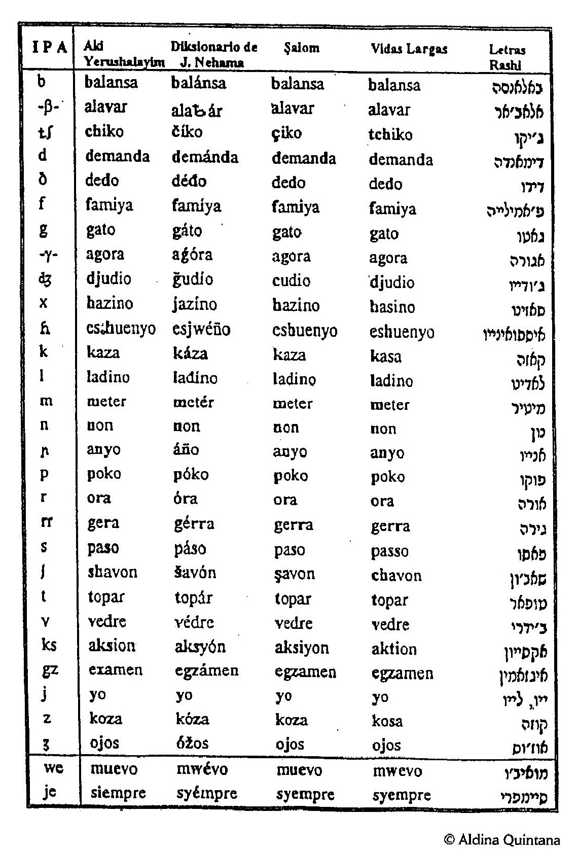 Übersicht der verschiedenen Grafien des Judenspanischen